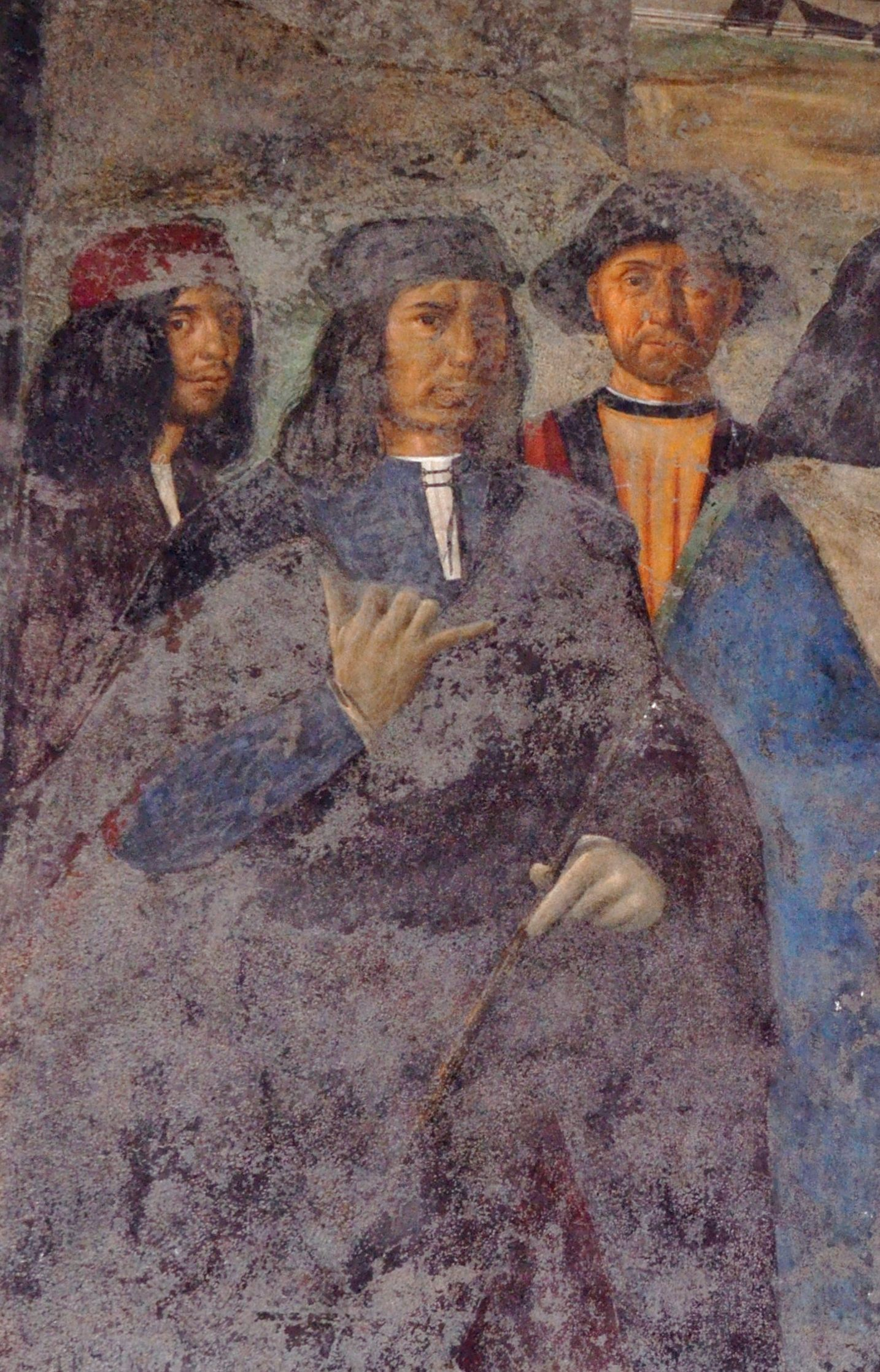 Autoritratto di Antonio Solario e deidue aiuti - particolare della Scena del Il santo accoglie due fanciulli - autore Antonio Solario 1515 ca. per il Chiostro del Platano (Convento dei Santi Severino e Sossio di Napoli)